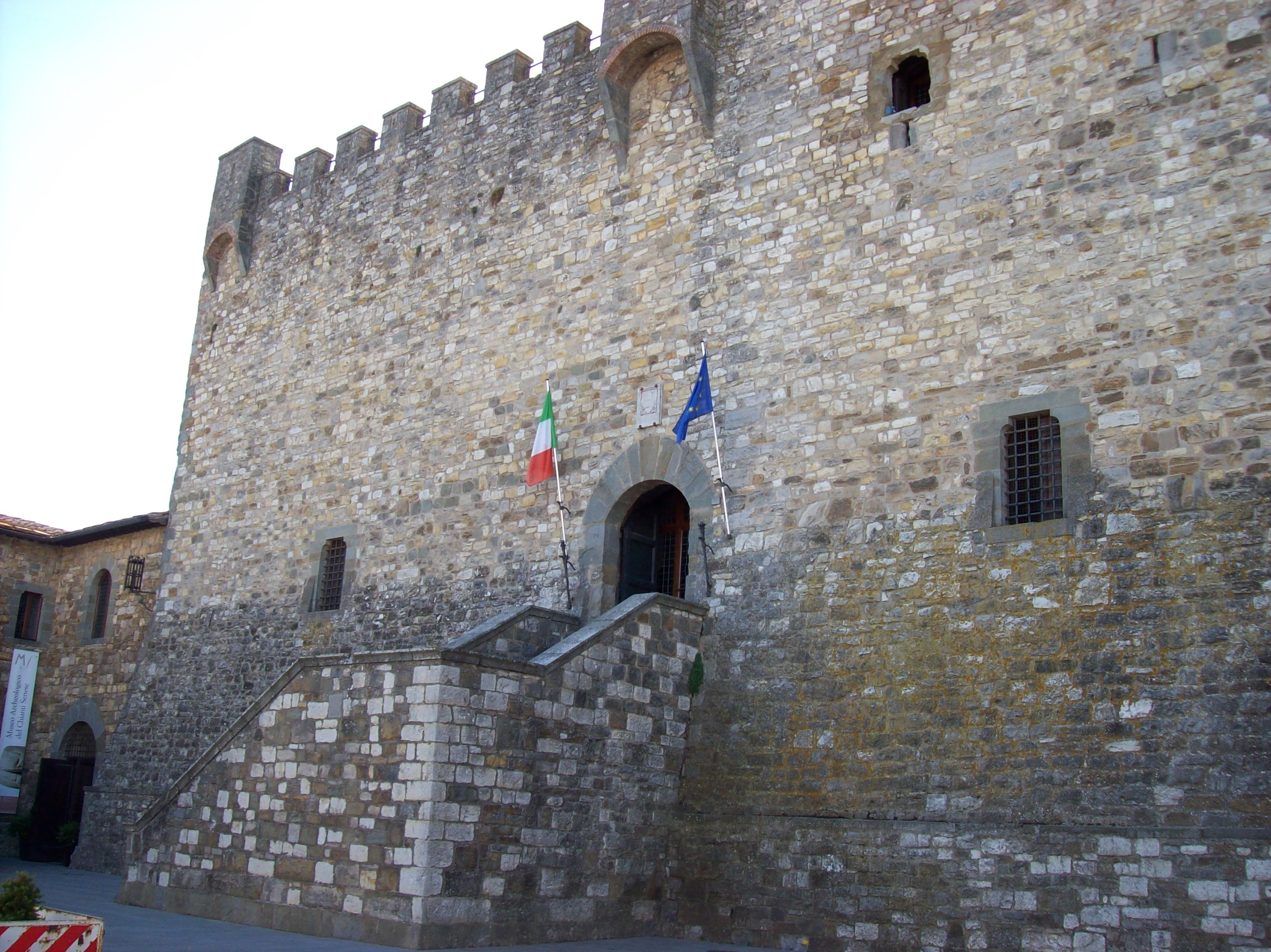 la Rocca di Castellina in Chianti (provincia di Siena)